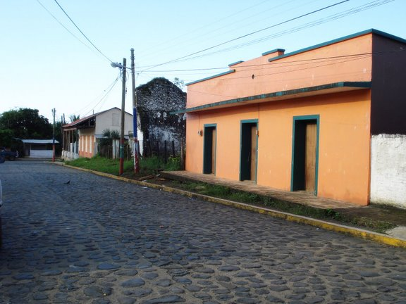 Calle ubicada en el centro de Chontla, Veracruz